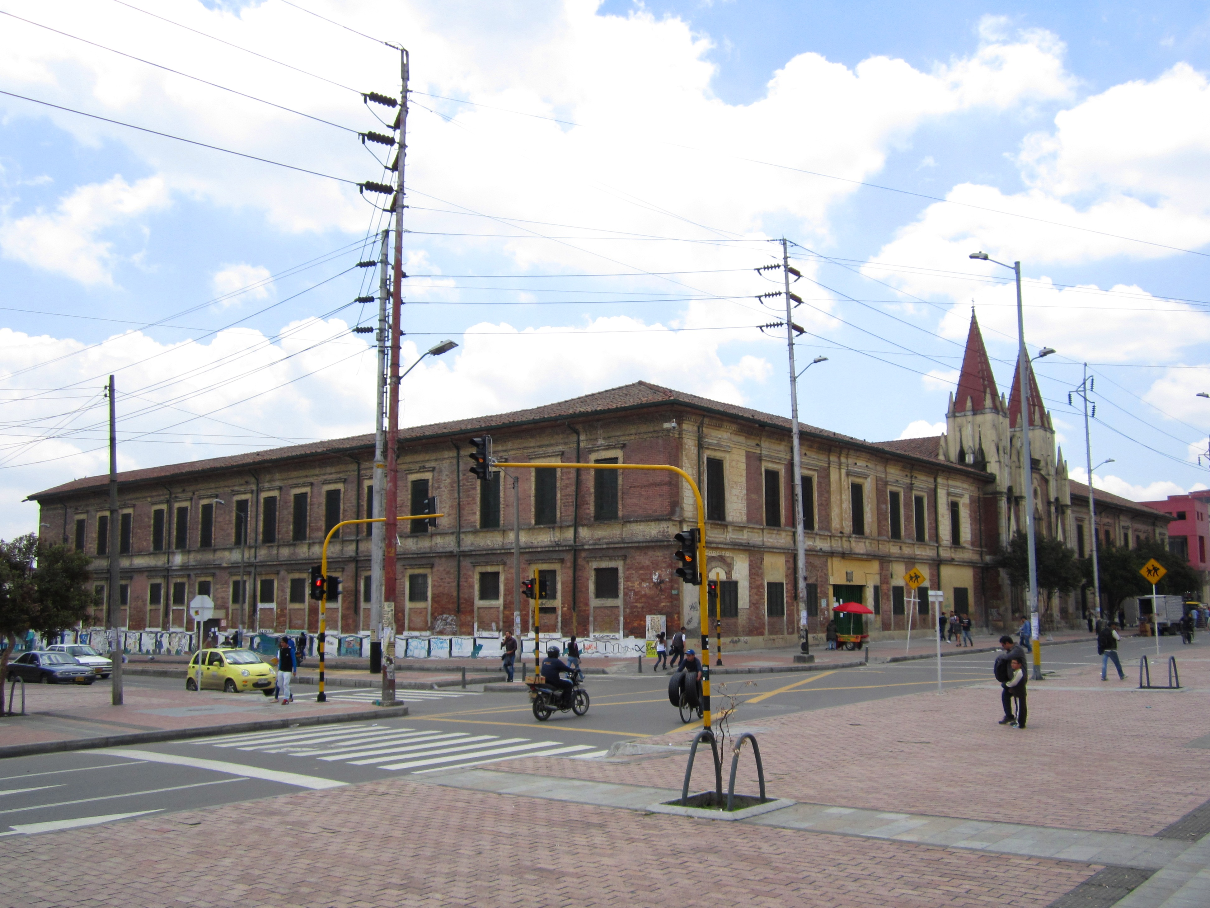 Bogotá Colegio Agustín Nieto Caballero en el costado noroccidental de la plaza España en la localidad de Los Mártires.